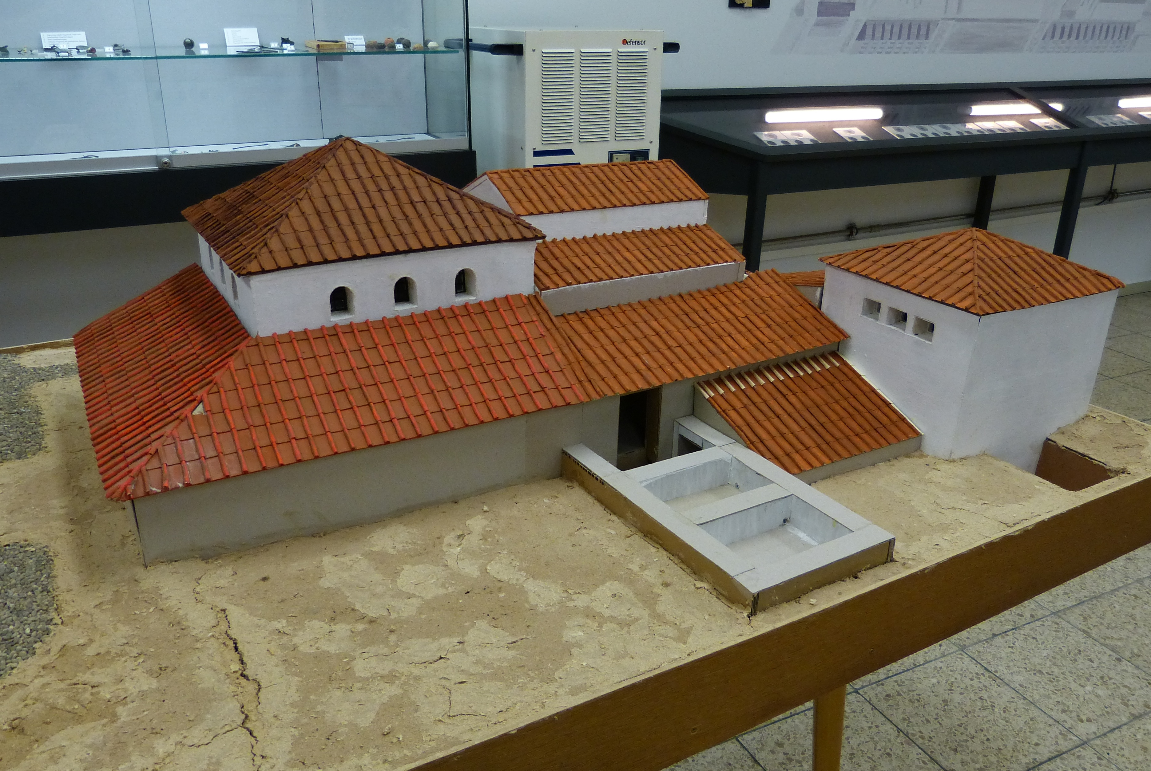 Archäologisches Museum Königsbrunn, Modell des römischen Bades.